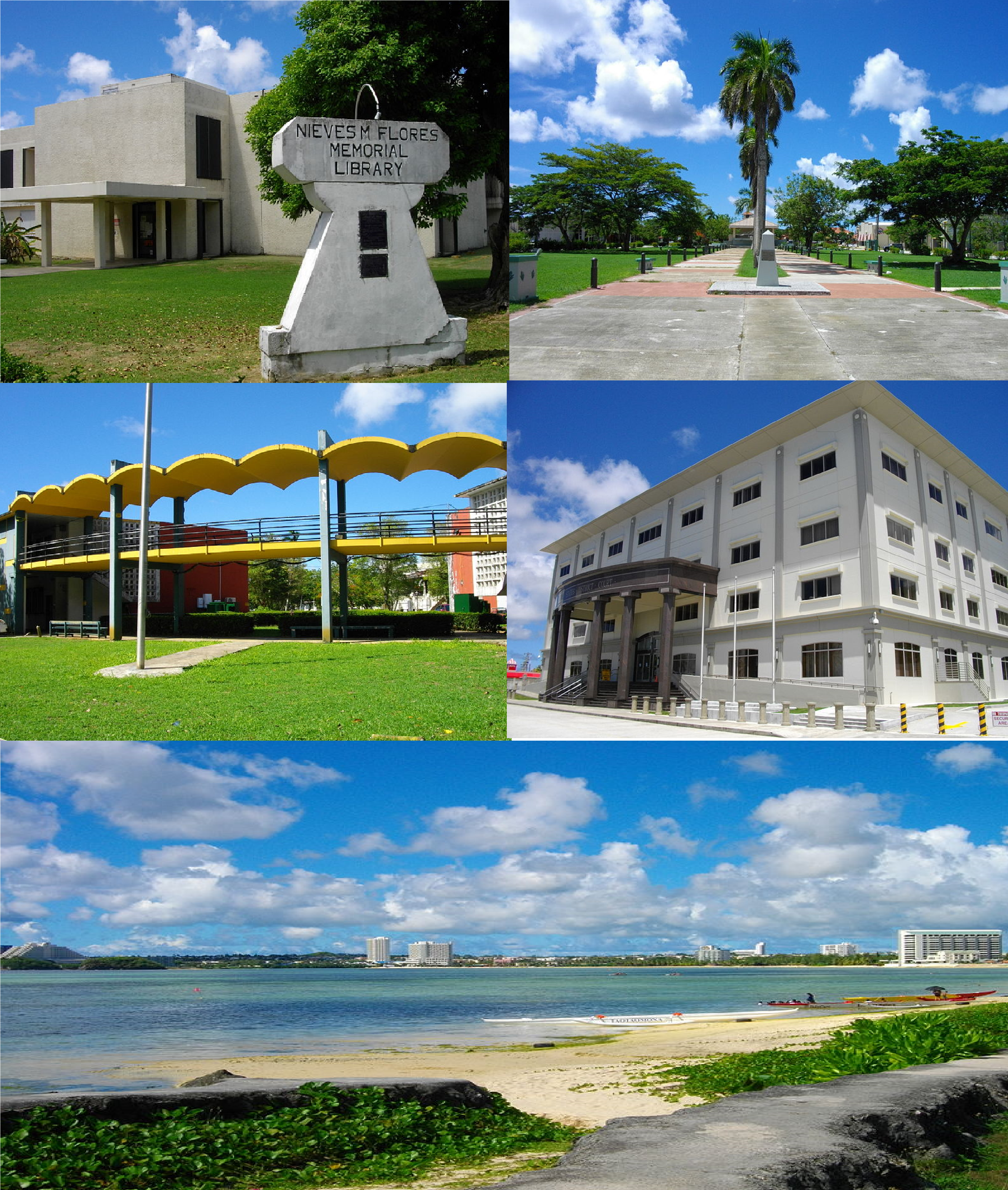 Agaña, ciudad de Guam en Oceanía.